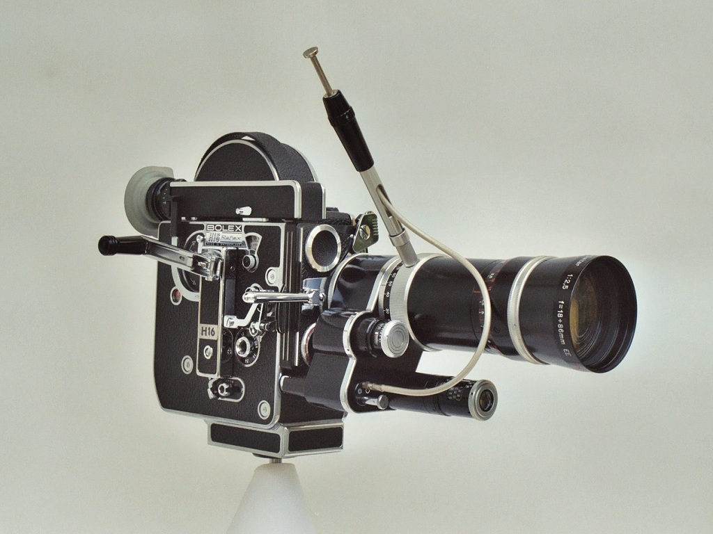 A Bolex H16 Reflex film camera.